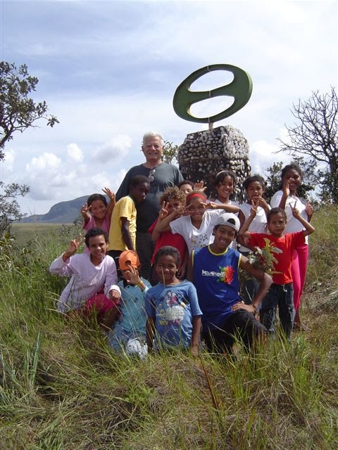 Monumento pri la Jubilea Simbolo en "Bieno-Lernejo Bona Espero", gvidata de ges. Gratapaglia, ĉe Alto Paraíso, Goiás, Brazilo. La infanoj estas la gelernantoj de Bela Horizonto, kaj la plenkreskulo estas Hilmar Ilton S. Ferreira, kiu proponis tiun simbolon, kiel Jubilean Simbolon